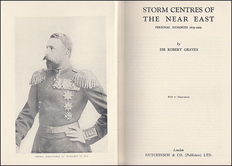 Graves, Robert Windham. Storm Centres of the Near East, Hutchinson, London, 1933.